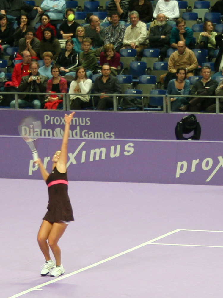 Ana Ivanović serving in Antwerp